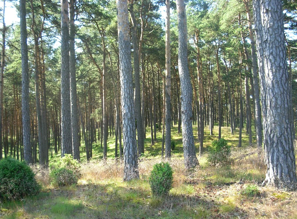 Bór sosnowy w Puszczy Bydgoskiej w pobliżu rezerwatu przyrody "Łążyn"